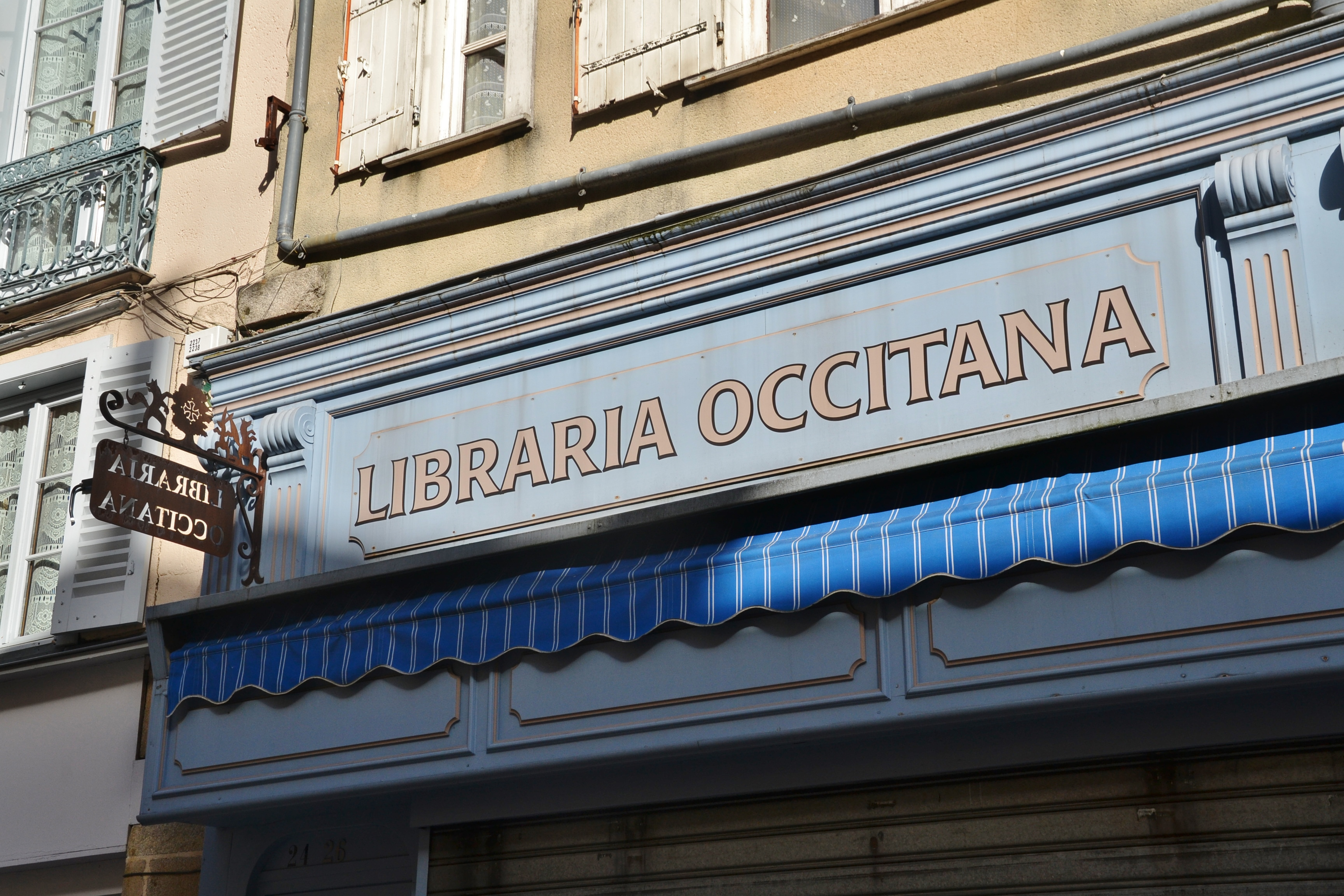 Enseigne de la librairie occitane "Libraria Occitana", rue Haute Vienne à Limoges (Haute-Vienne, France)